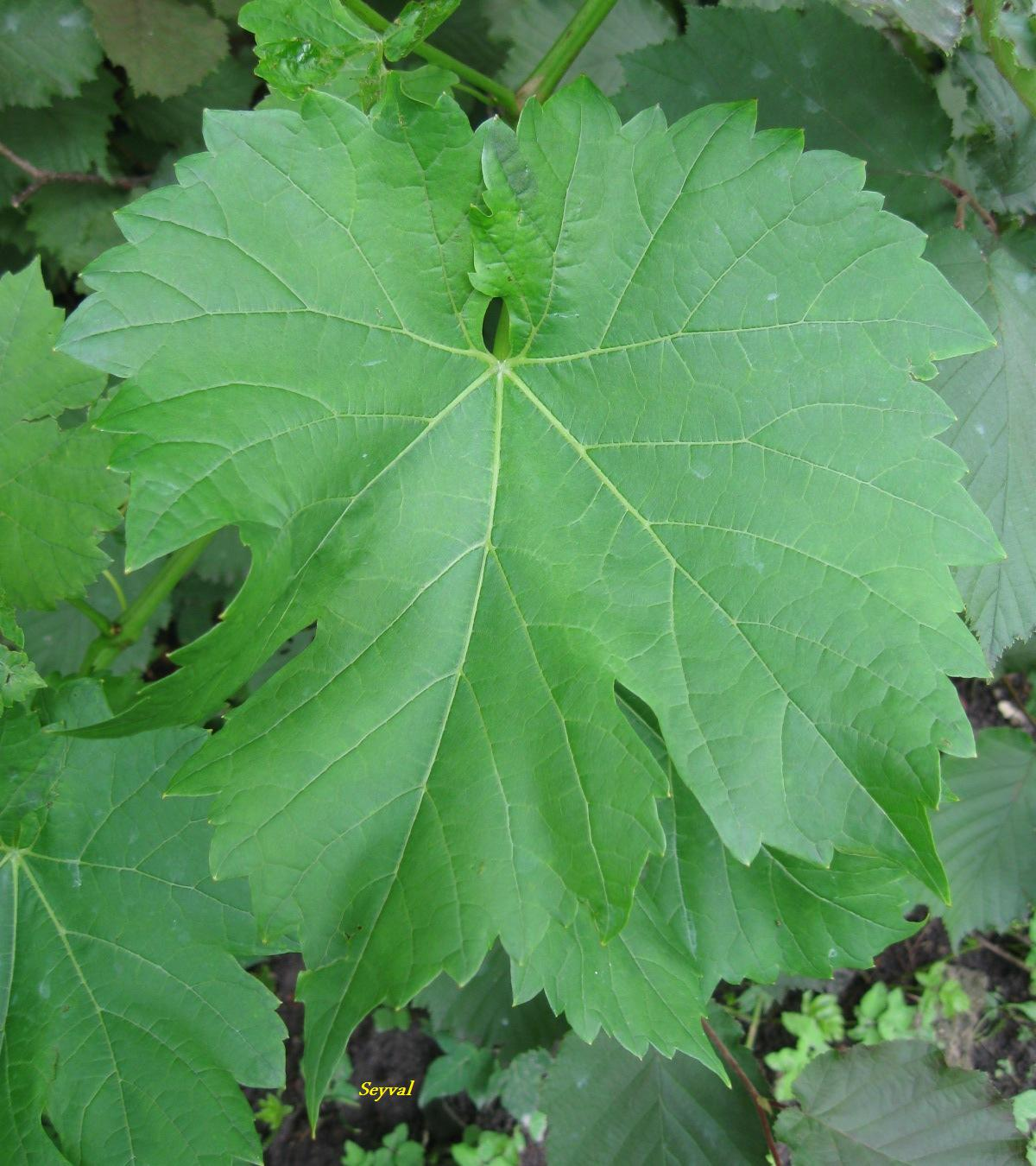 Liść odmiany 'Seyval blanc' na krzewie